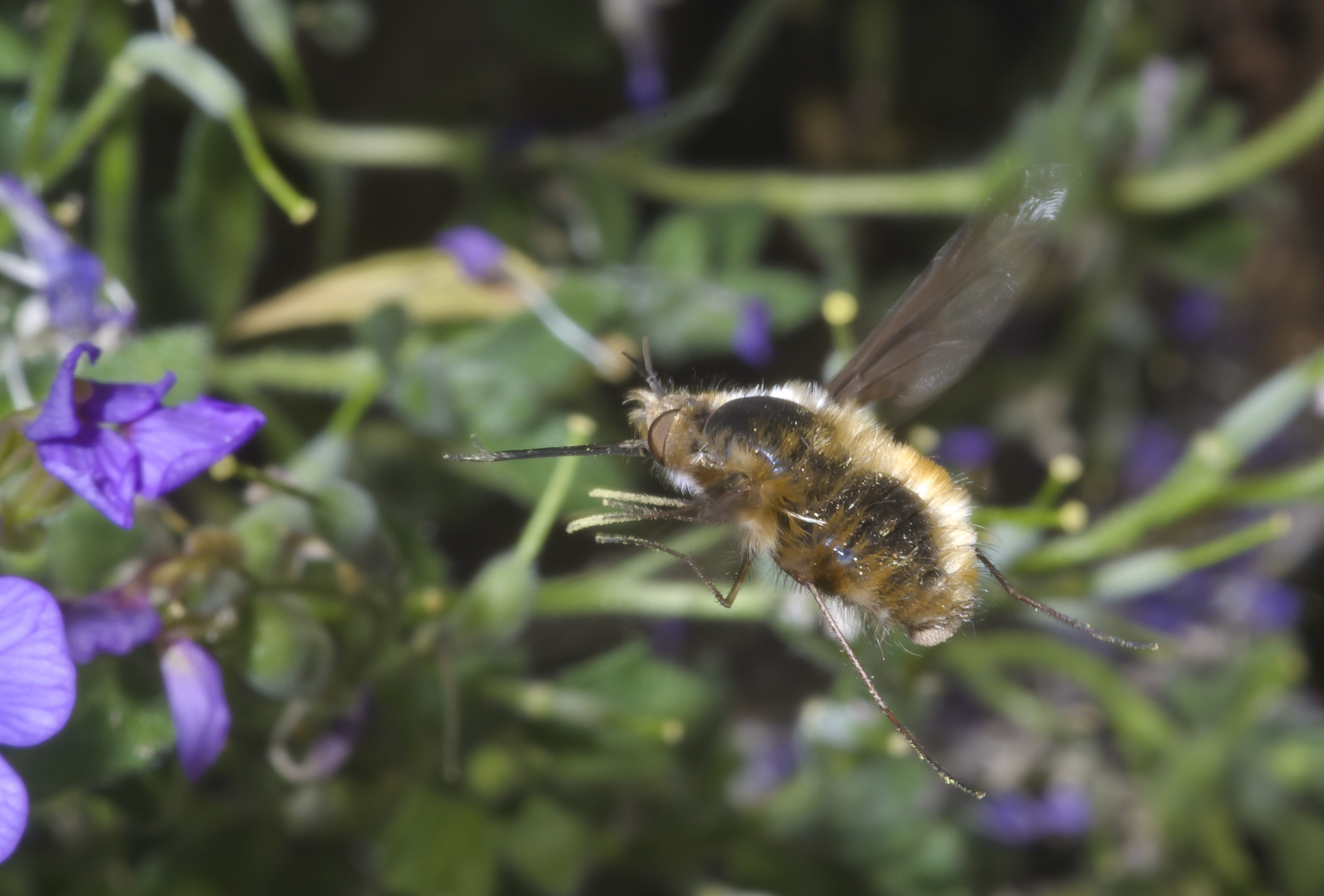 Großer Wollschweber (Bombylius major) im Flug (aufgenommen in Stuttgart)